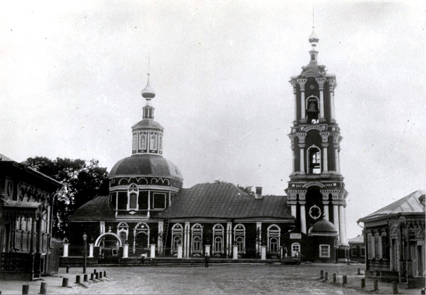 Resurrection Church in RyazanВоскресенская церковь в Рязани (снесена в 1954 г.)